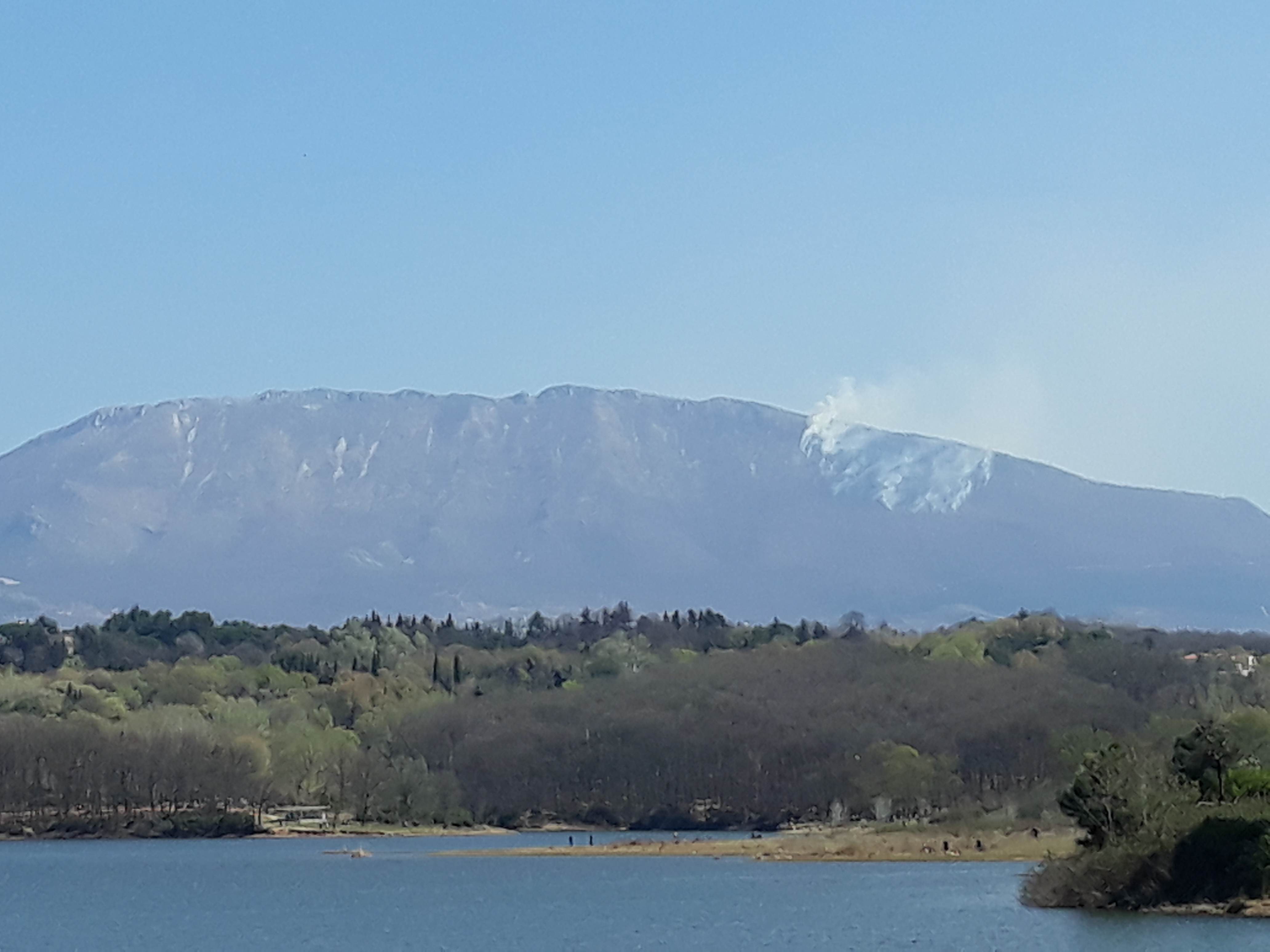 Djegia përfundimtare e Malit të Priskës